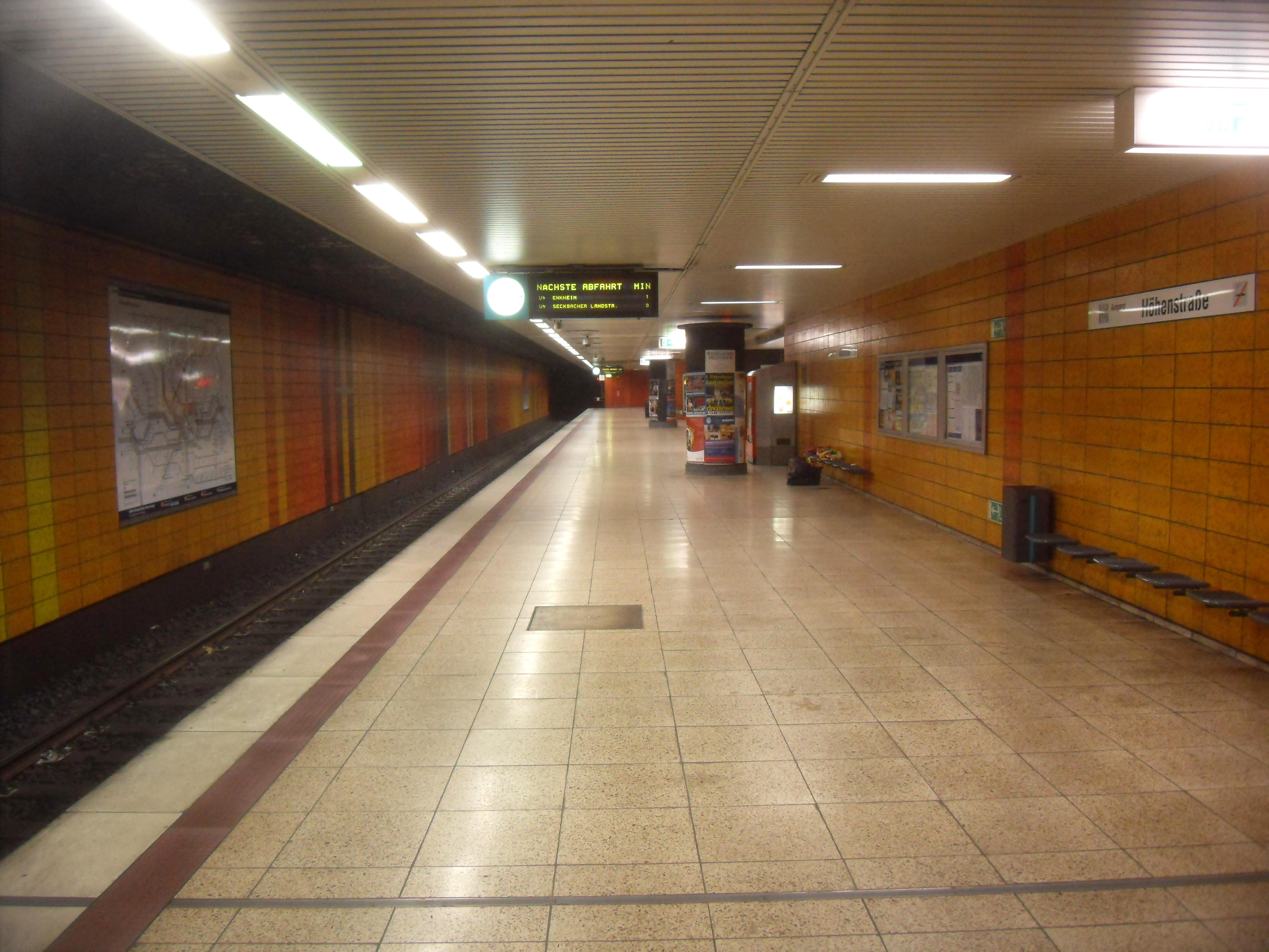 Bahnsteig der C-Ebene des U-Bahnhofs Höhenstraße (Richtung Seckbacher Landstraße) der U-Bahn Frankfurt auf der Linie U 4 in Hessen (Deutschland)